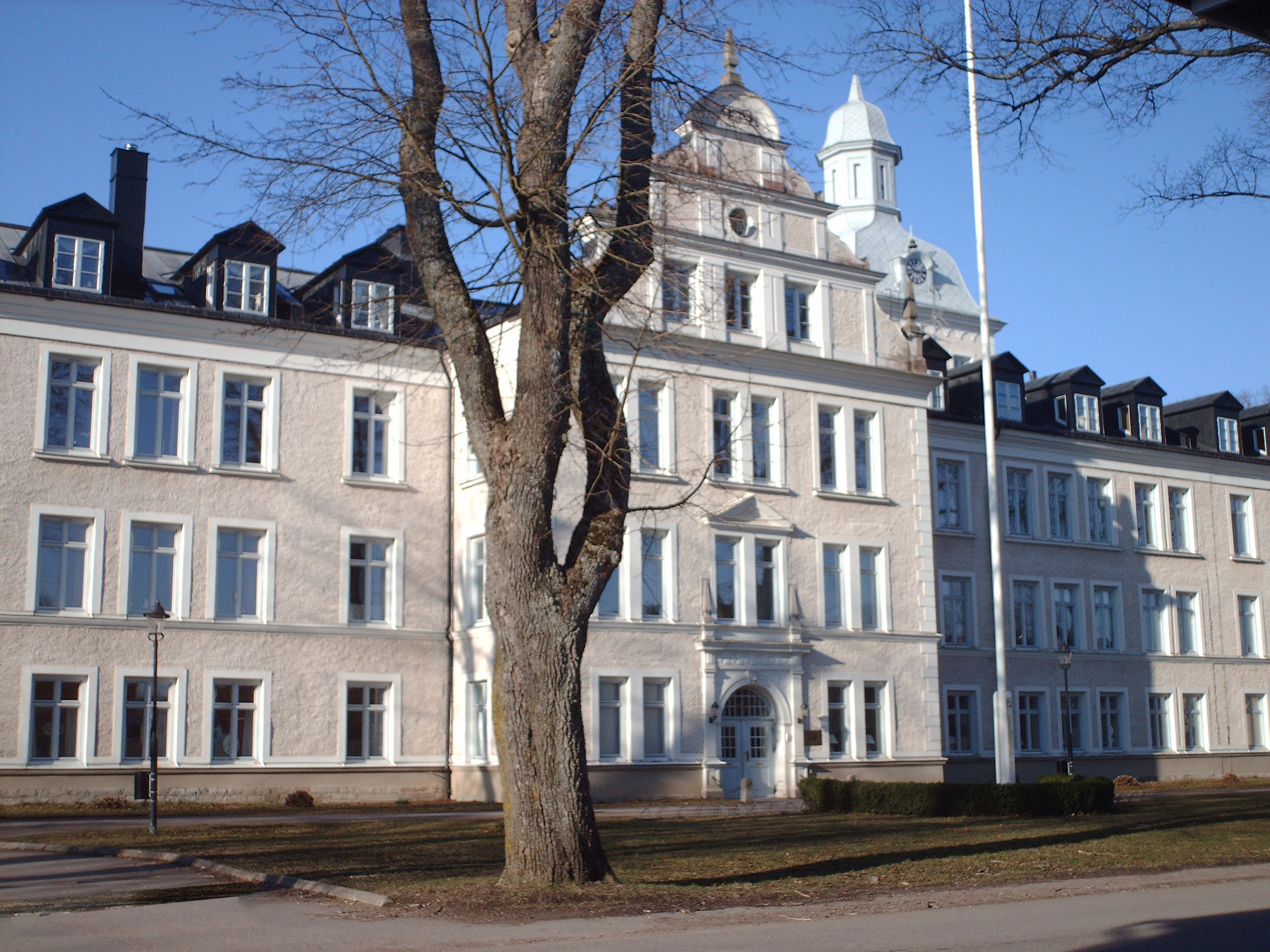 Asylen, Vadstena hospital, Sweden.